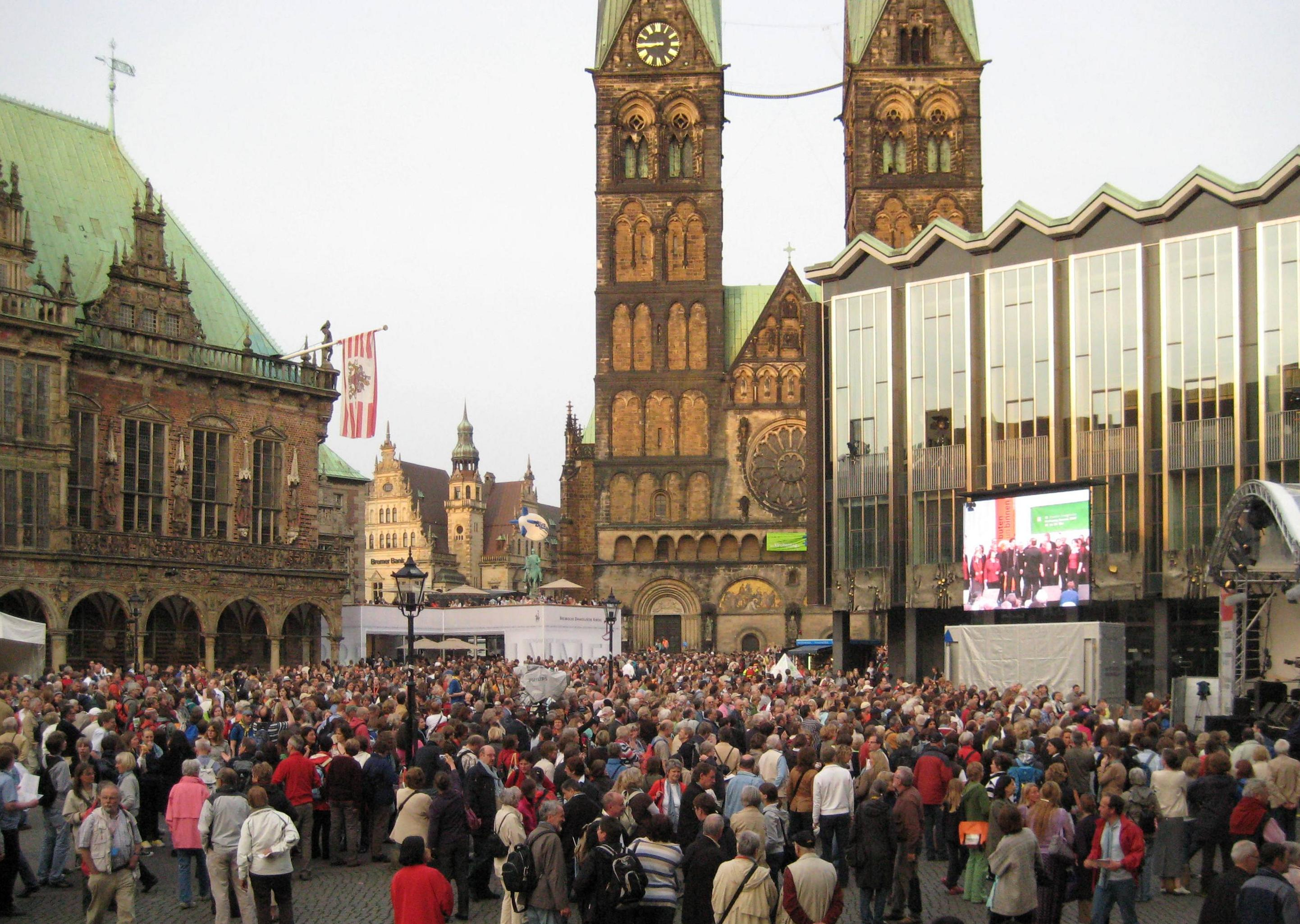 32. Deutscher Evangelischer Kirchentag in Bremen, "Abend der Begegnung", Marktplatz: Musikprogramm "Oh, Happy Day" (Gospels & Spirituals)